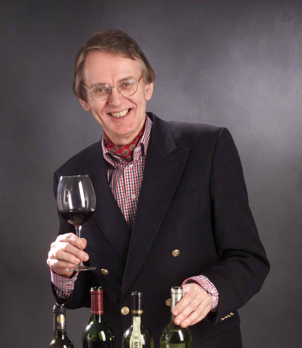 Foto door Hubrecht Duijker zelf aan Dolph Kohnstamm gestuurd voor gebruik in Wikipedia met de verzekering erbij dat deze foto rechtenvrij is en onder GFDL verspreid mag worden.